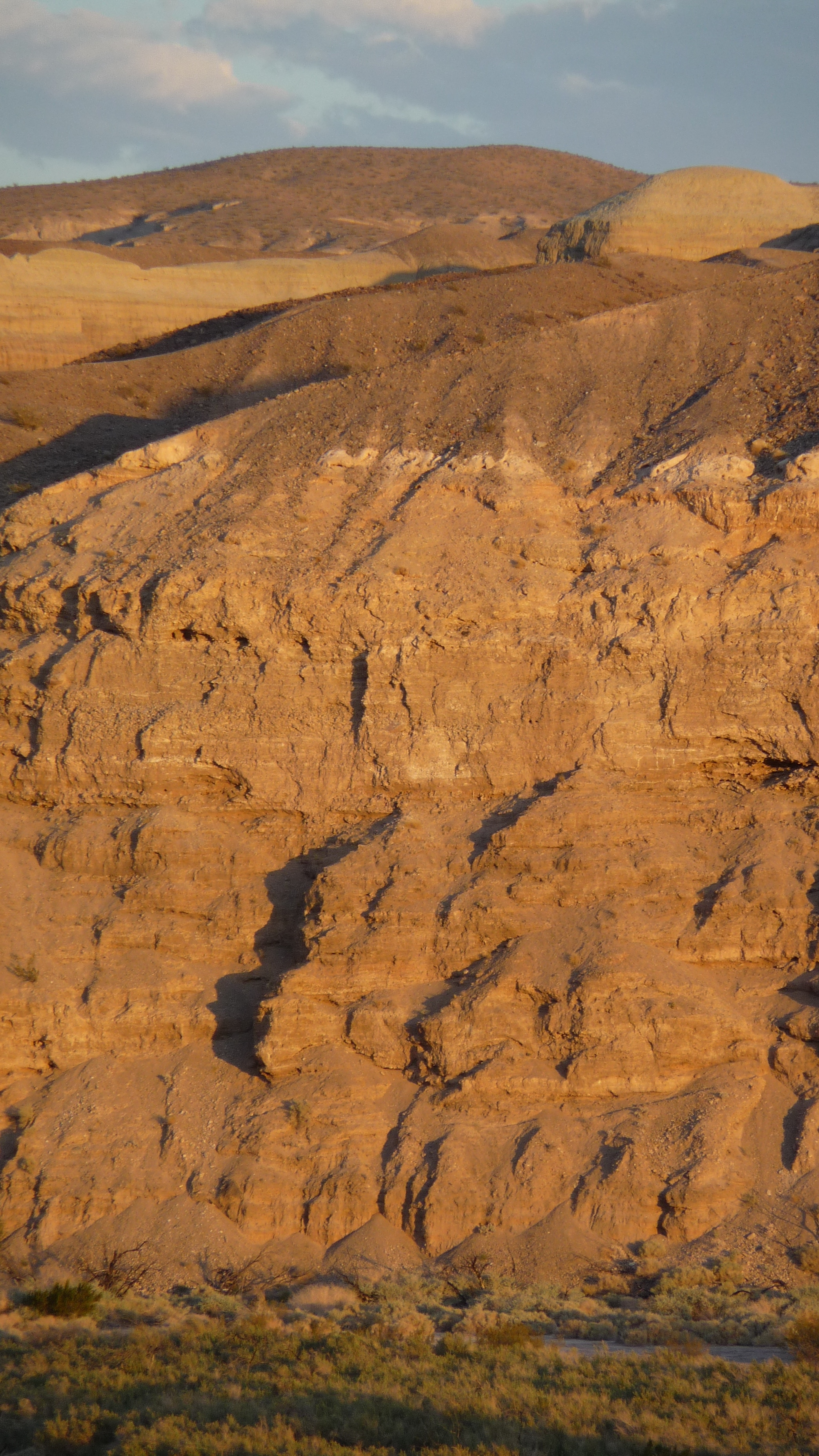 Lake Manix - canyon wall